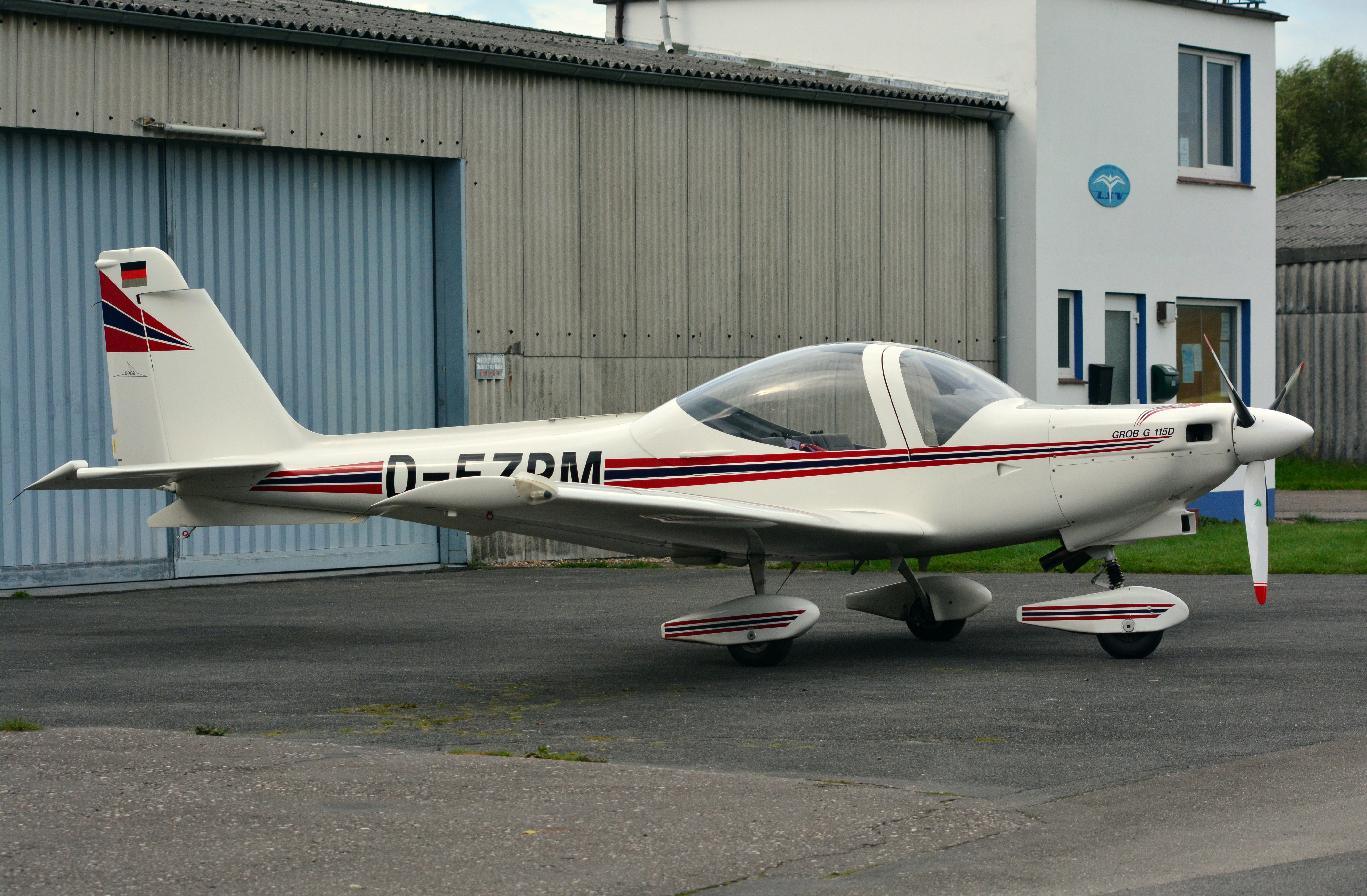 Grob 115 D Acro (D-EZPM) auf dem Flugplatz Uetersen